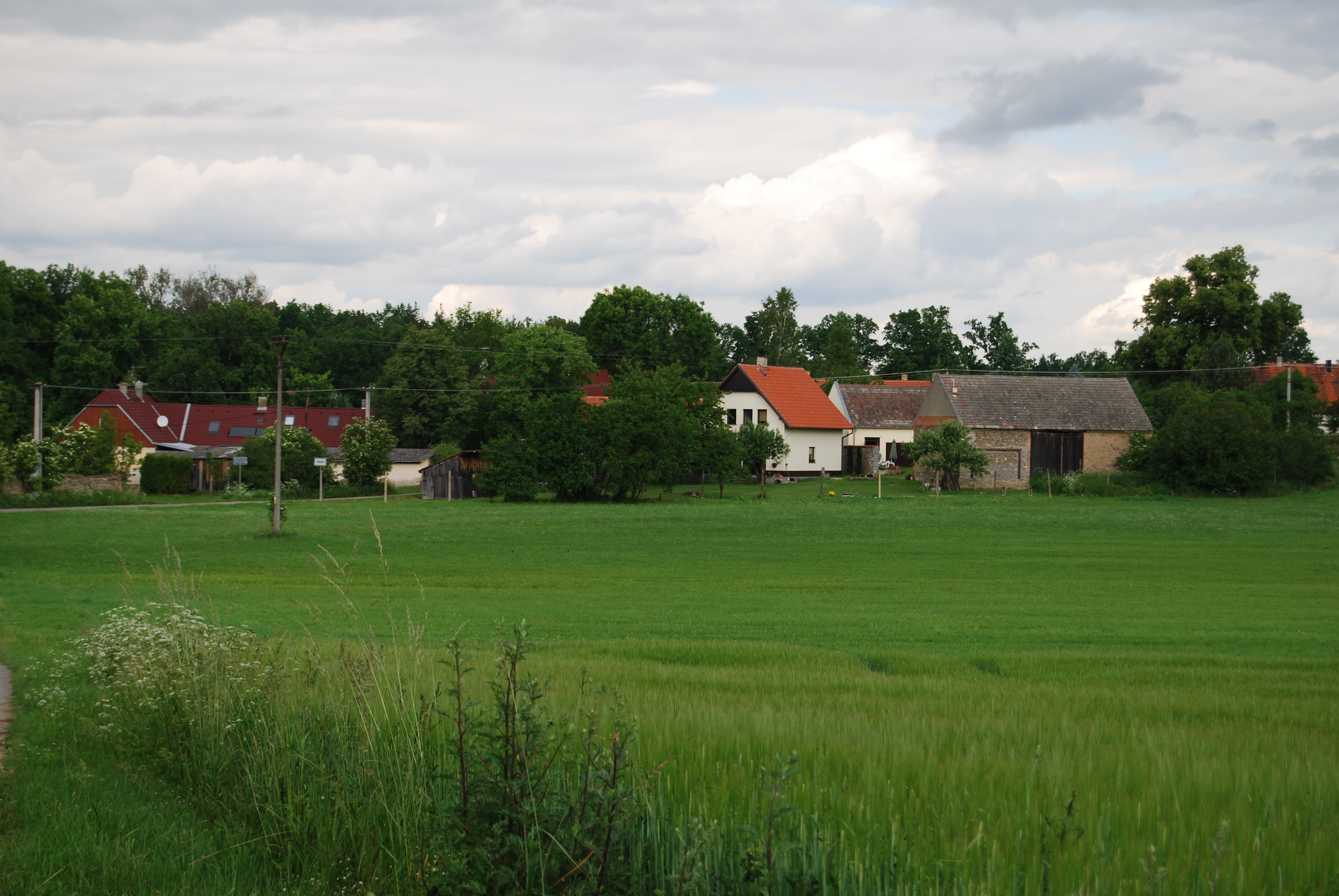 Pohled na obec. Vrábsko je část obce Smetanova Lhota v okrese Písek. Česká republika.